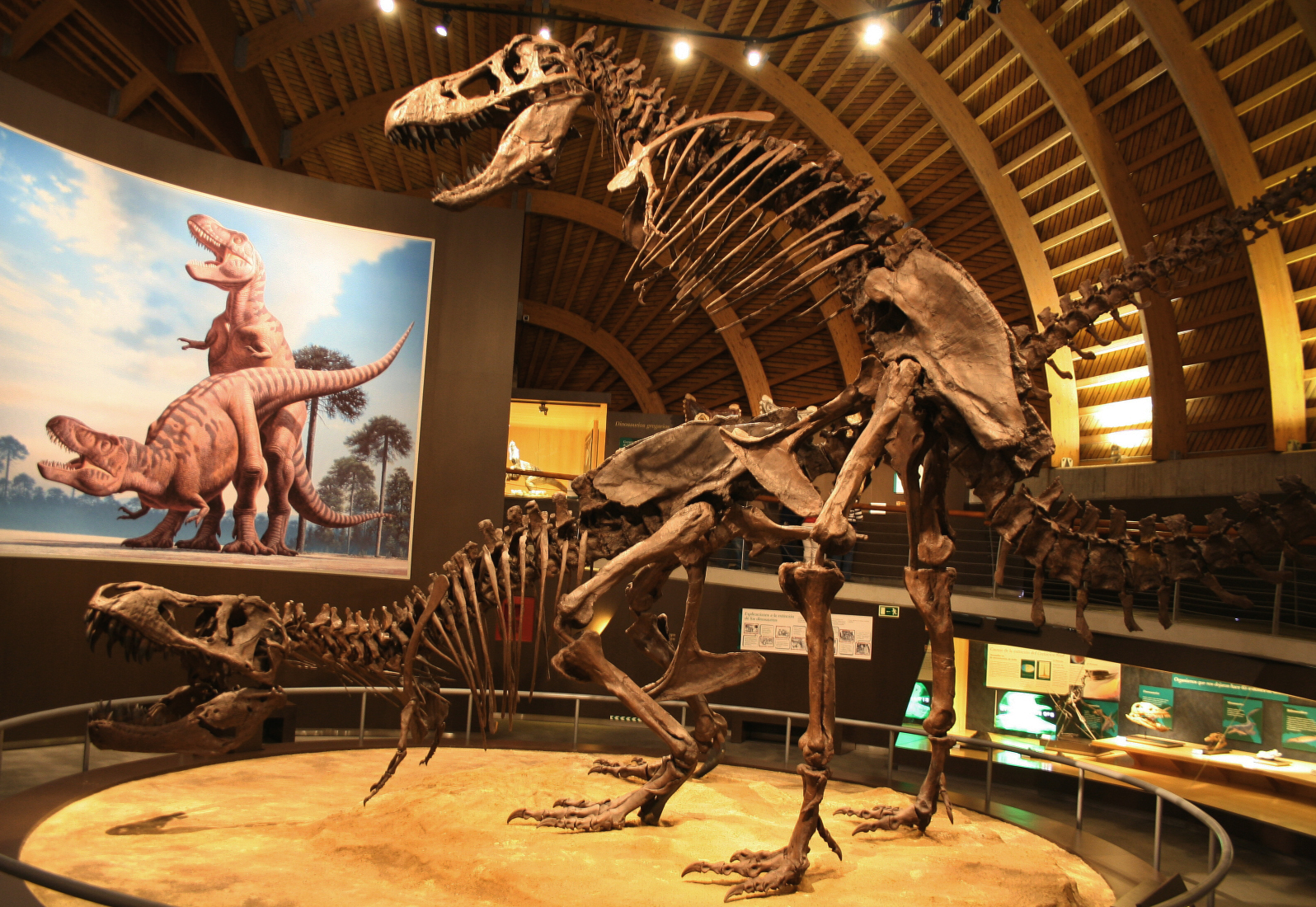 Reconstrucción de la cópula de dos Tyrannosaurus rex en el MUJA, Asturias, España.